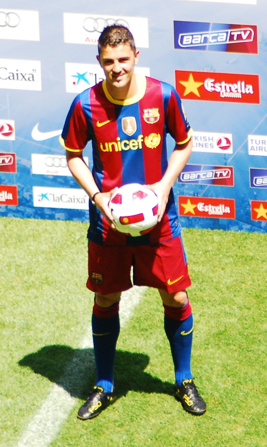 Presentación de David Villa como jugador del FC Barcelona.